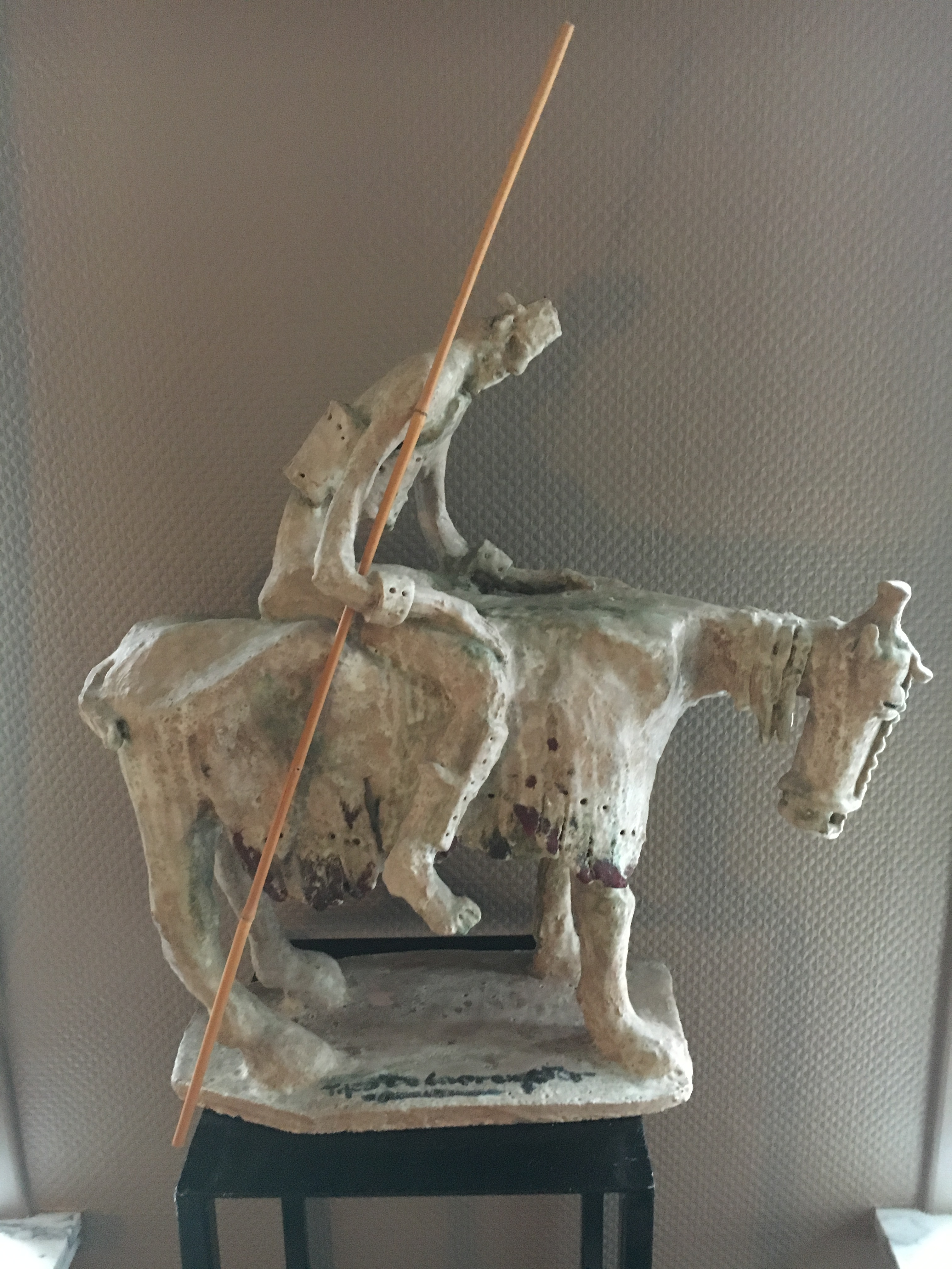 Sculptuur in keramiek, werk van Theo De Cooremeter, kunstenaar te Mendonk, België